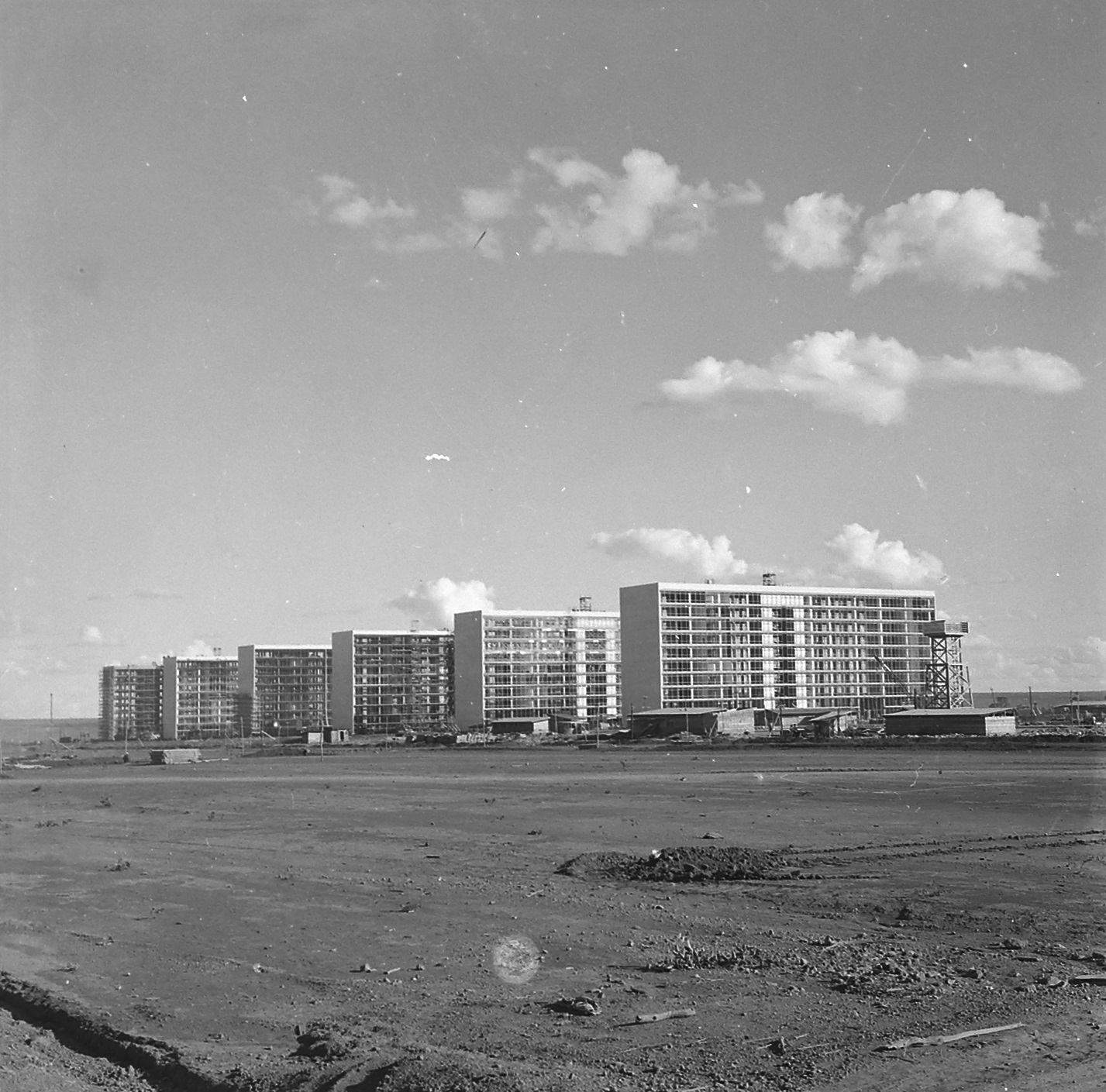 Obras de Construção dos Ministérios, Brasília